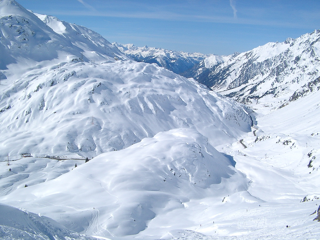 St. Anton - Blick auf die Passstraße Blick vom Galzig gegen Westen auf die Passstraße bei St. Anton am Arlberg. Ganz links im Bild der Ortseingang von St. Christoph am Arlberg.